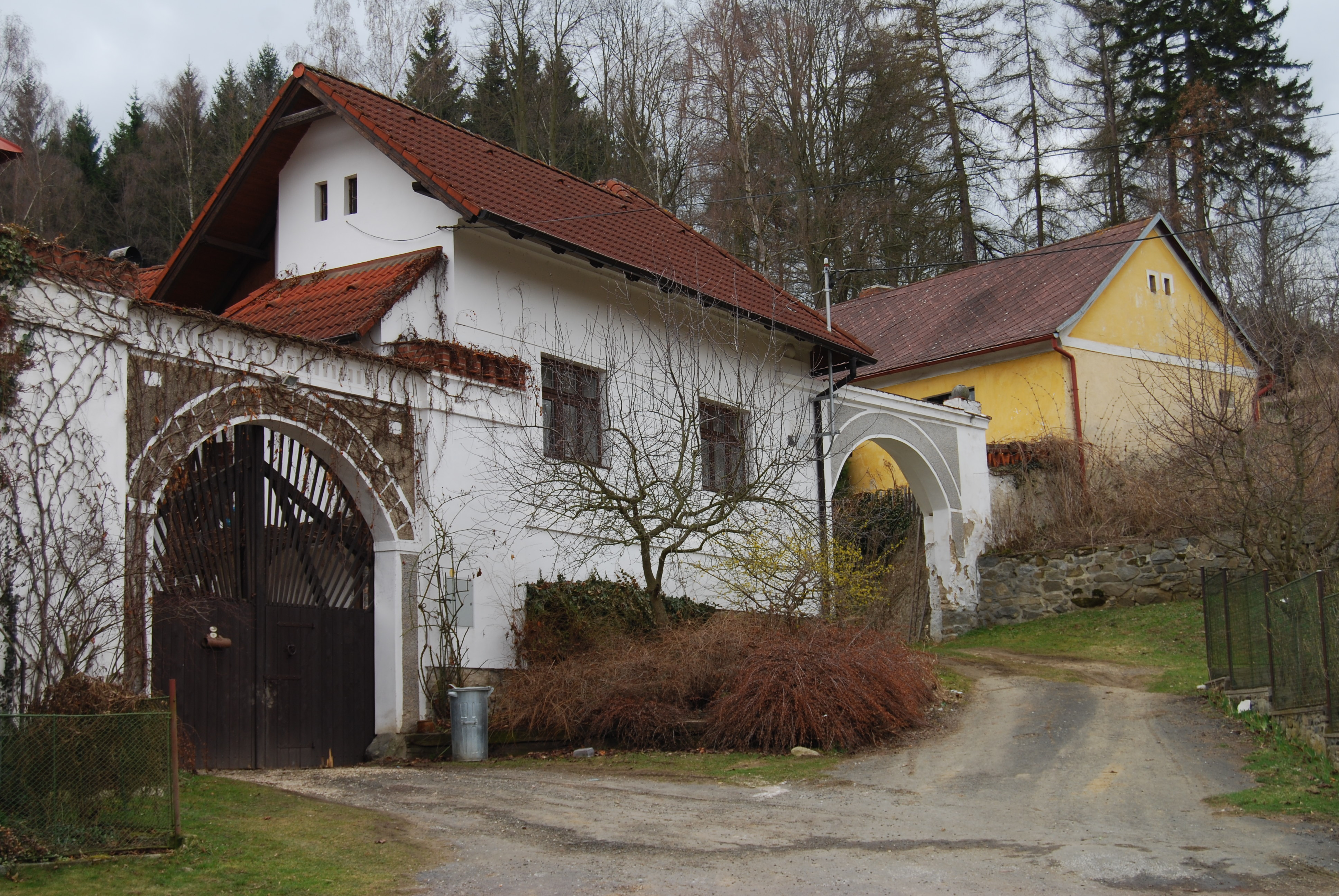 Usedlost v obci. Vletice je malá vesnice, část obce Krásná Hora nad Vltavou v okrese Příbram. Česká republika.